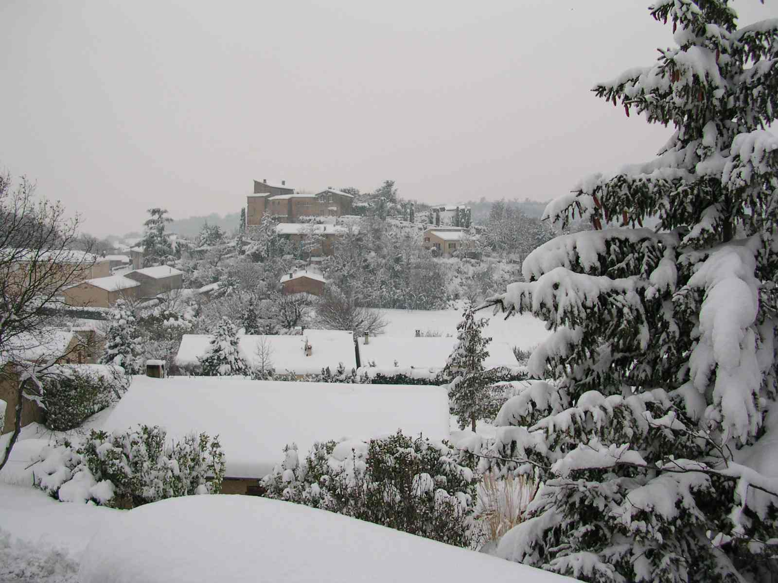 Le château de Eurre sous la neige, Hiver 2006. vue du lotissement "Le Hameau de Laye"